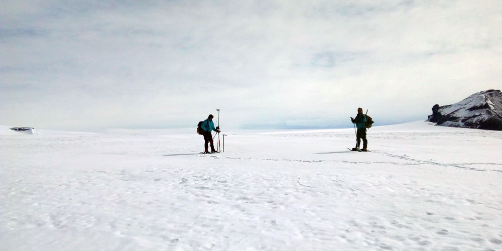 El Instituto Geográfico Nacional (IGN), dependiente del Ministerio de Defensa, participó en la Campaña Antártica de Verano 2017-2018 para brindar el apoyo topográfico y geodésico para el proyecto científico Balance de masa y dinámica de glaciares en la Península Antártica y Patagonia Austral, desarrollado por el Departamento Glaciología del Instituto Antártico Argentino (IAA), perteneciente a la Dirección Nacional del Antártico (DNA). Para llevar a cabo esa tarea fue designado Ricardo Darío Torres, perteneciente a la Dirección de Geodesia del IGN, quien trabajó en la Isla Vega, donde realizó diversas actividades sobre el Glaciar Bahía del Diablo, entre ellas mediciones de diferentes balizamientos para determinar velocidad, para las que empleó dos receptores GPS de doble frecuencia. Los trabajos que se realizan sobre el glaciar son utilizados como parámetro para monitorear la evolución de los hielos ante el impacto del calentamiento terrestre y constituyen un valioso aporte al Servicio de Monitoreo Mundial de Glaciares de la UNEP-UNESCO, llevado a cabo desde hace muchos años por el IAA.